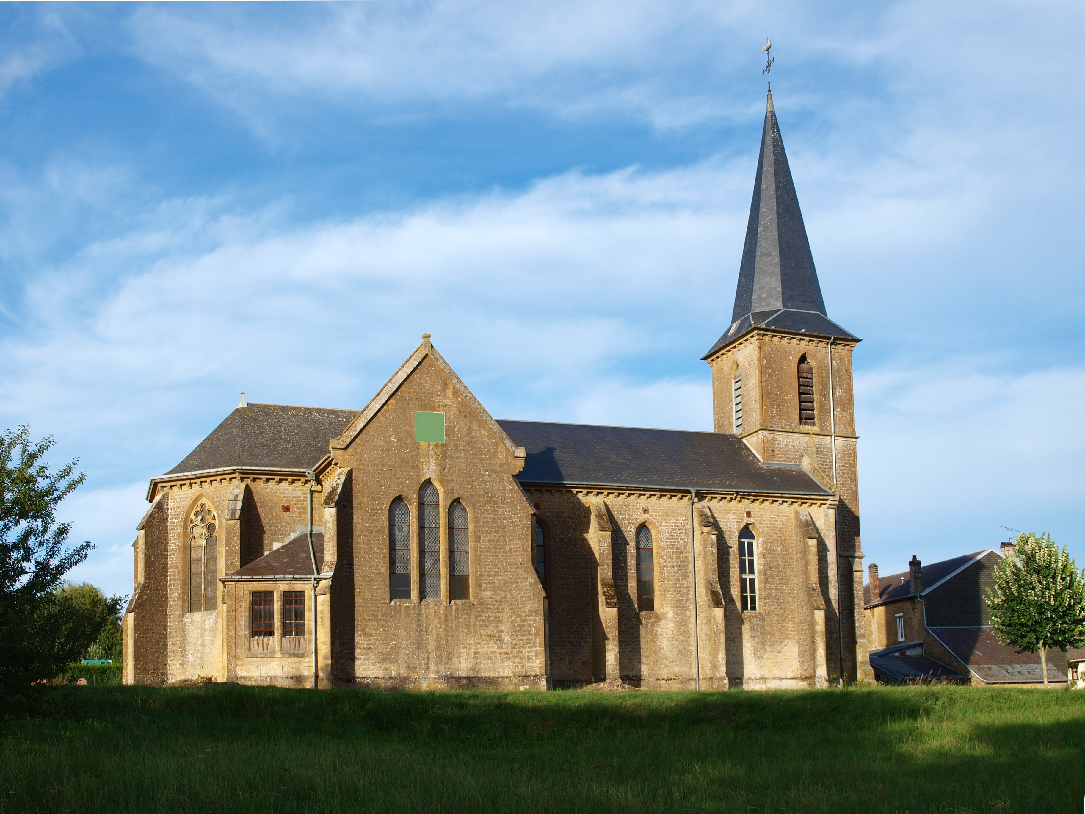 Villers-le-Tilleul (Ardennes, France) ; église